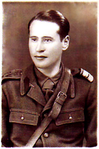 Fotografia este singura pe care am găsit-o pe internet şi am editat-o puţin în GIMP.